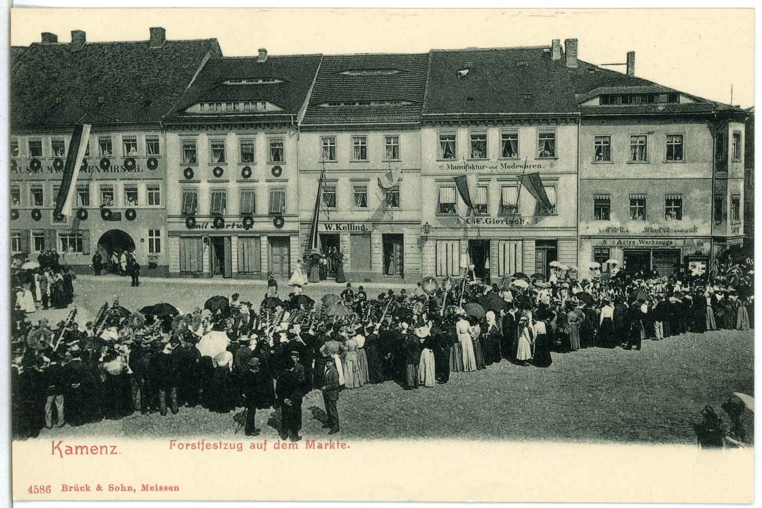 Kamenz; Forstfestzug auf dem Markt This postcard is from publisher Brück & Sohn in Meißen ( This postcard has a unique number 04586 and is available in a higher resolution at the publisher. This images was uploaded in a cooperation project between Wikipedians and the publisher.